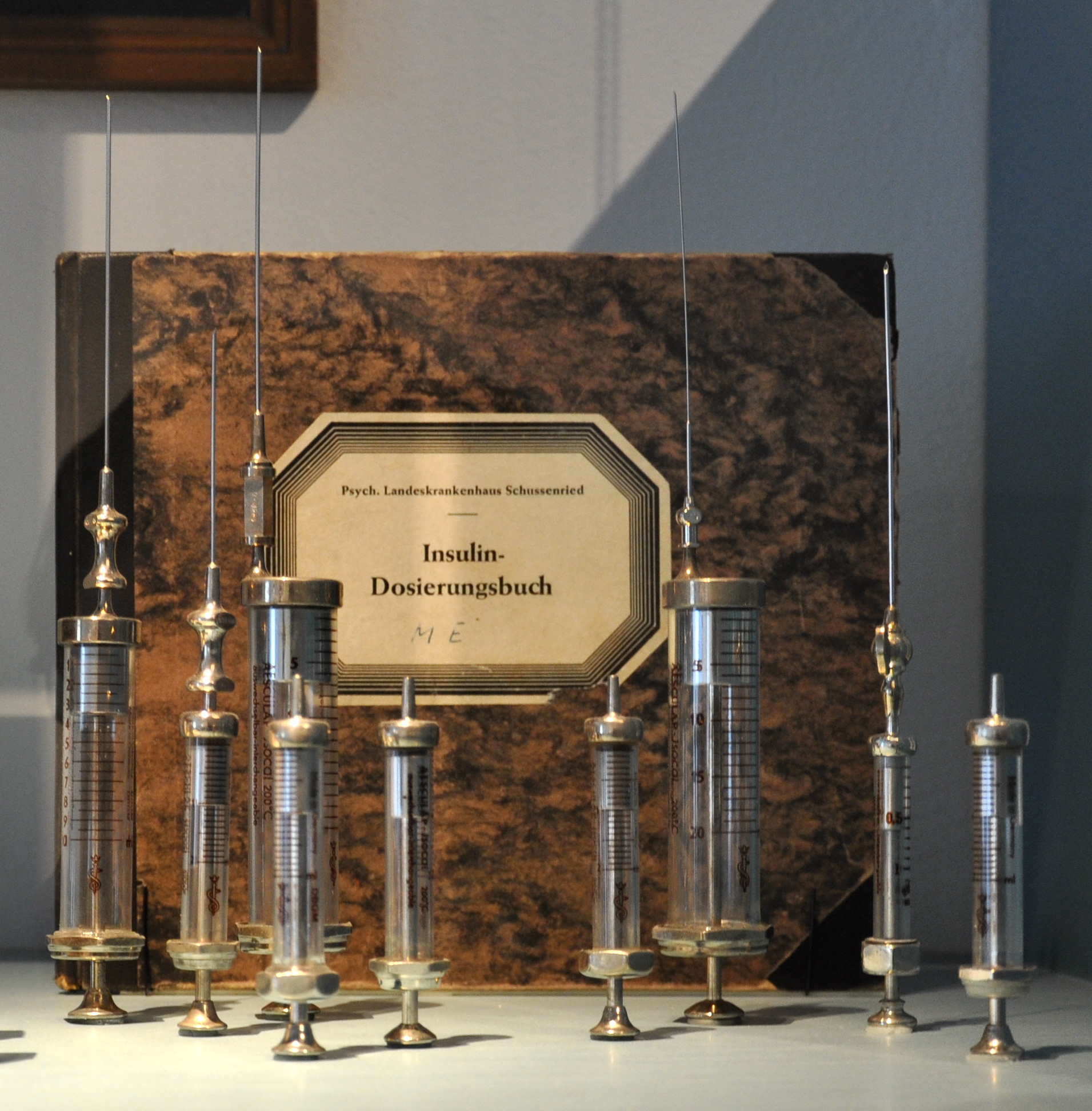 Insulindosierungsbuch und Spritzen aus dem Psychiatrischen Landeskrankenhaus Schussenried; ausgestellt im Neuen Kloster Schussenried